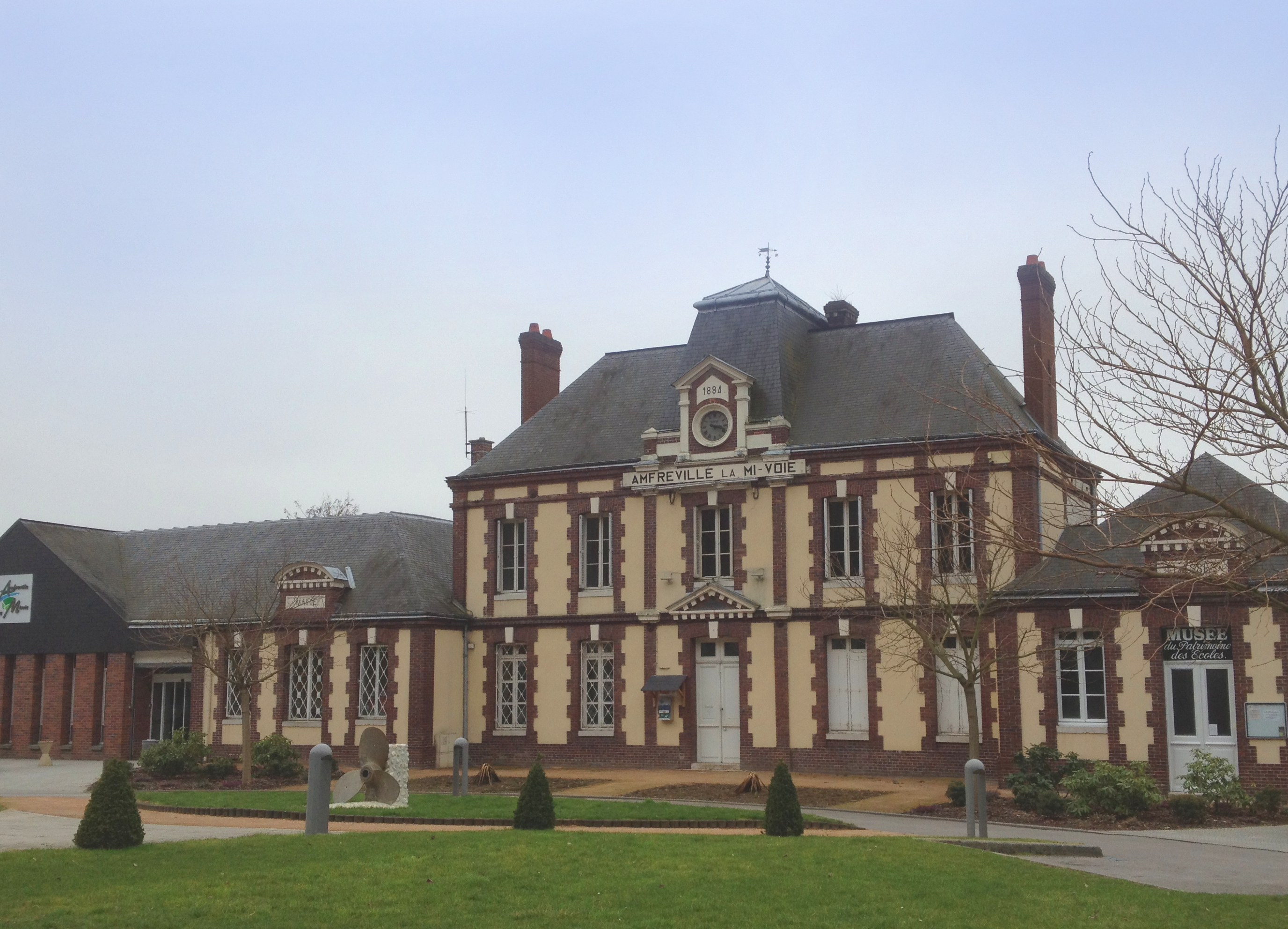 Mairie d'Amfreville-la-Mi-Voie.